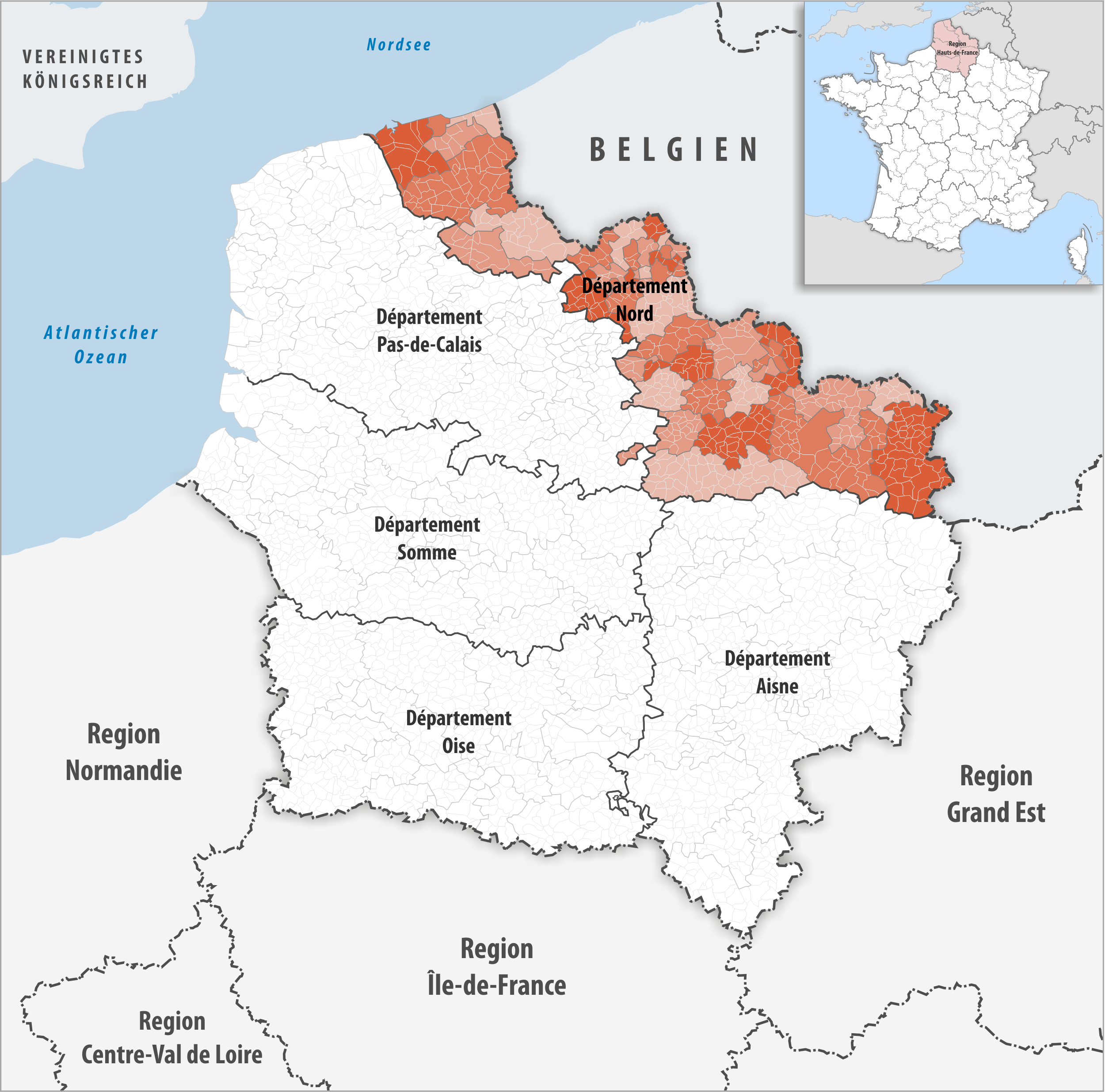 Lage des Departements Nord